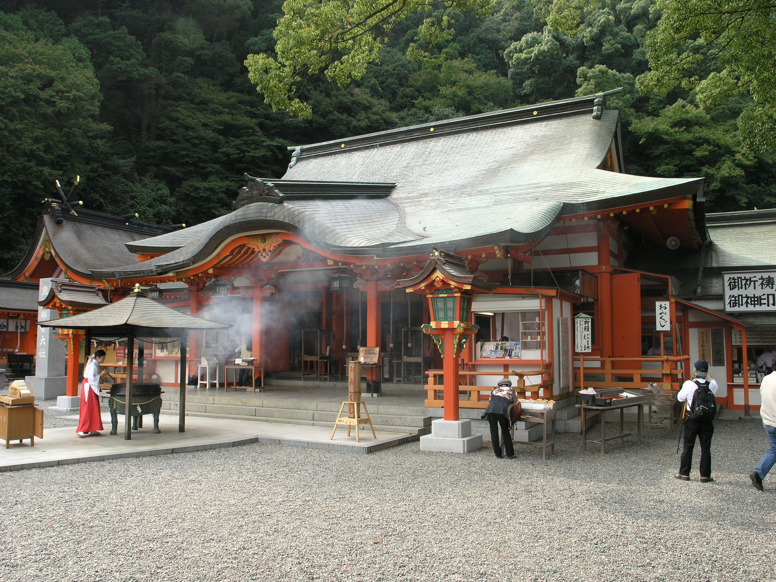 熊野那智大社 (和歌山県東牟婁郡那智勝浦町) 2008年10月撮影。 機材：C8080WZ 撮影者：Kansai explorer